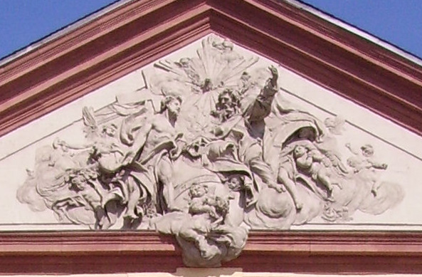 1:Giebelrelief Heilige Dreifaltigkeit an der Schlosskirche in Mannheim von Paul Egell (1691-1752).